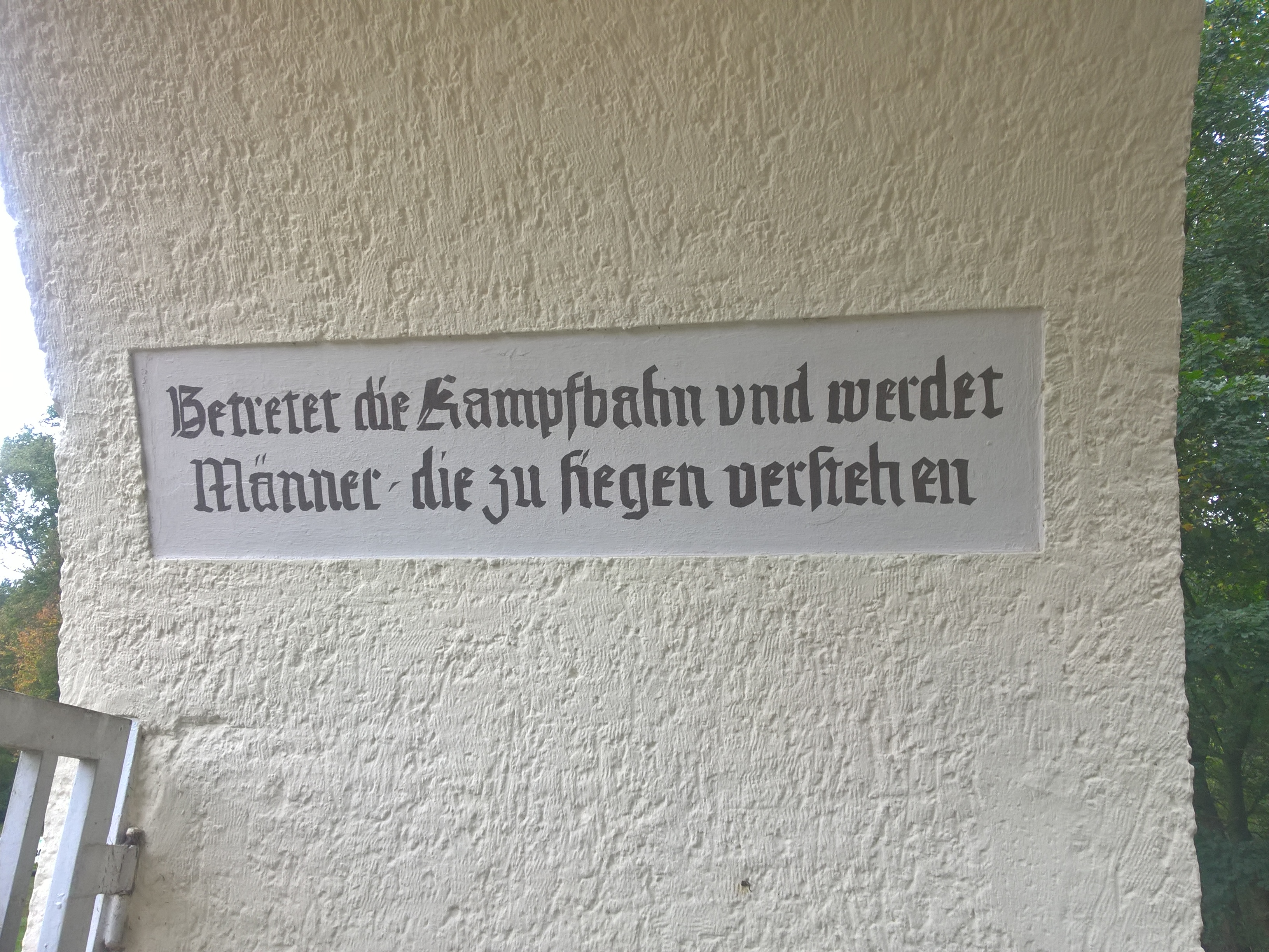 Inschrift im Eingangstor zum Sportpark Katzenbusch in Herten